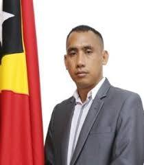 José Telo Soares Cristovão